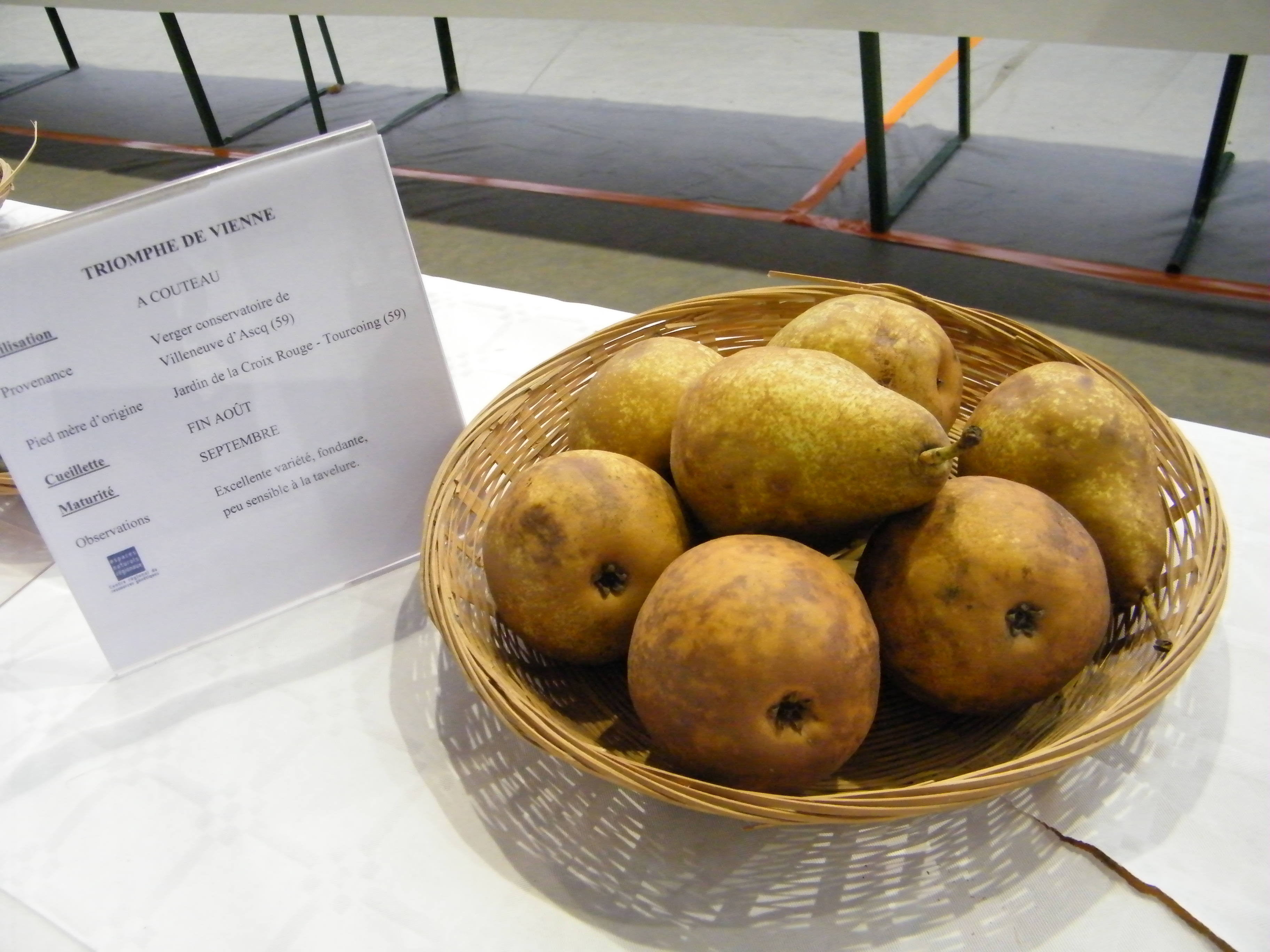 Triomphe de Vienne, Ailly-le-Haut-Clocher, Somme, Fr,Apple festival 03et04-11-2018 (61)